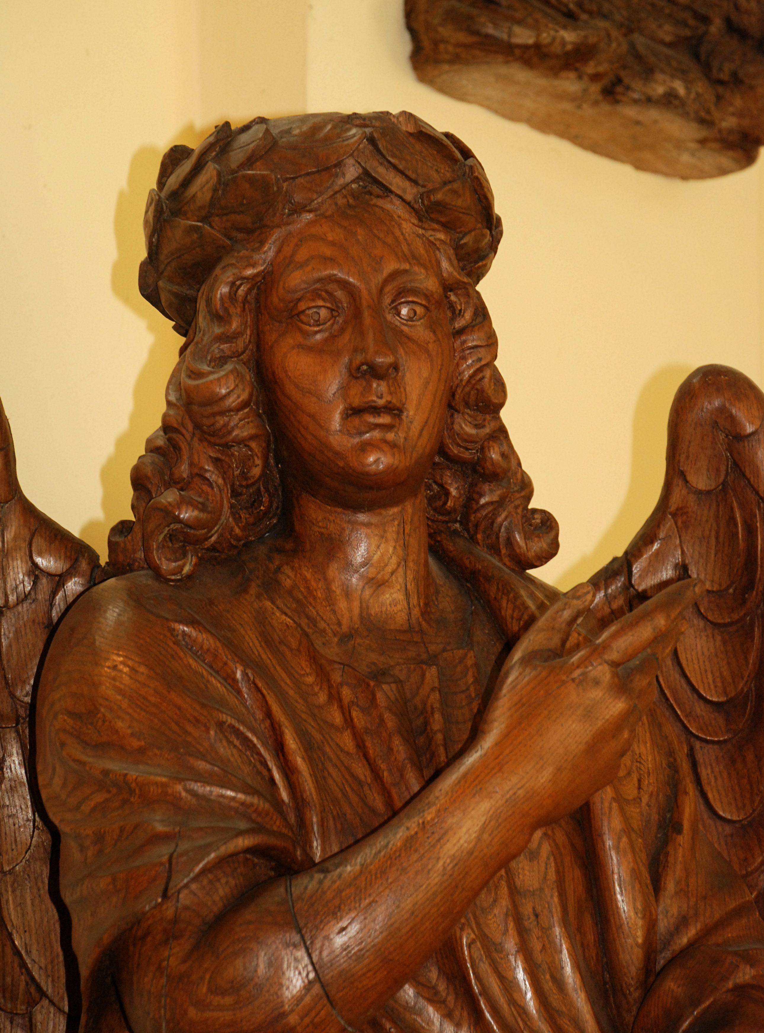 Belgique - Brabant wallon - Mont-Saint-Guibert - Église Saint-Guibert - statuaire baroque provenant de l'ancienne église des Augustins de Bruxelles (désacralisée en 1842)